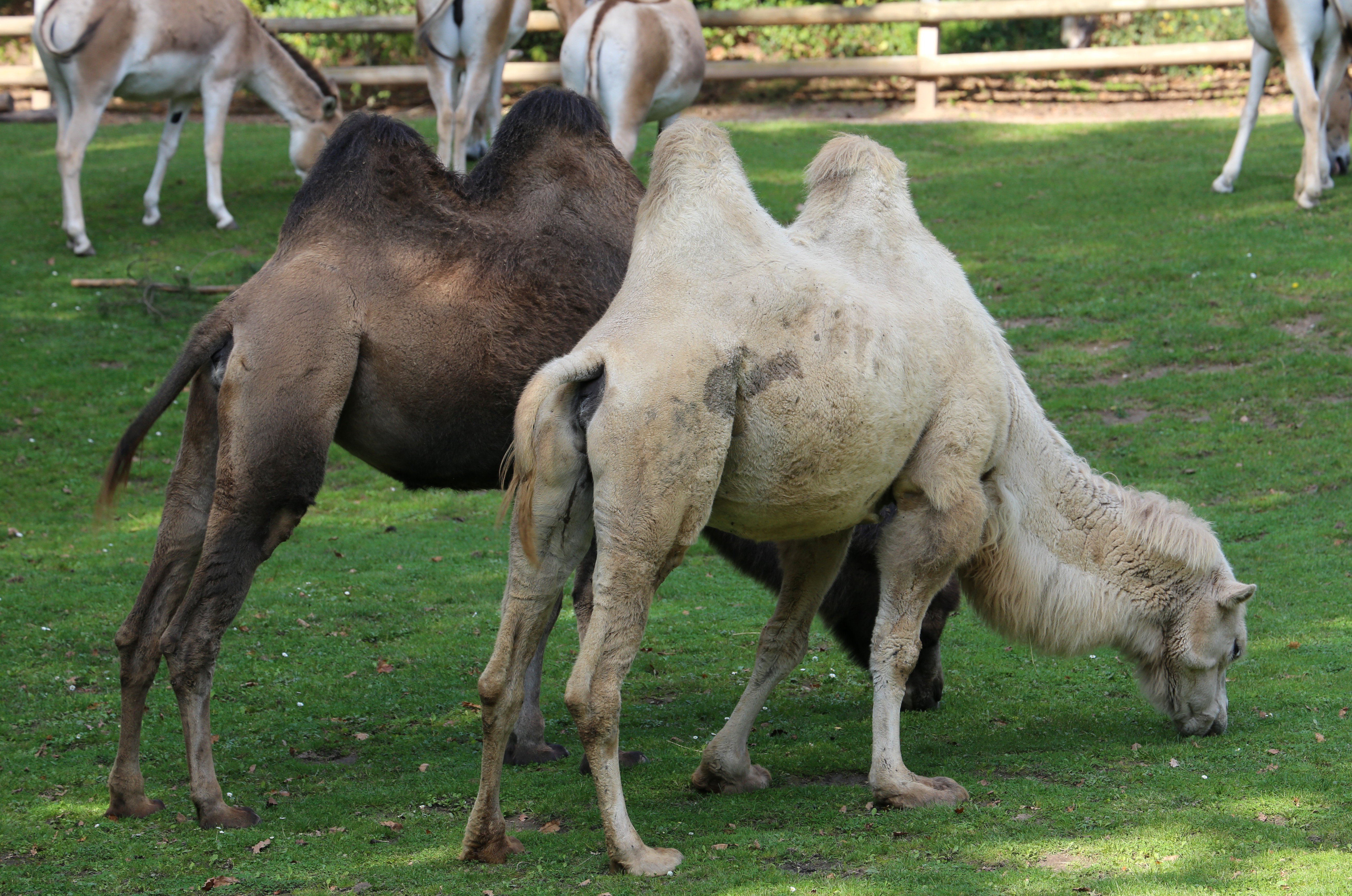 Trampeltier (Camelus ferus f. bactrianus), Tiergarten Nürnberg